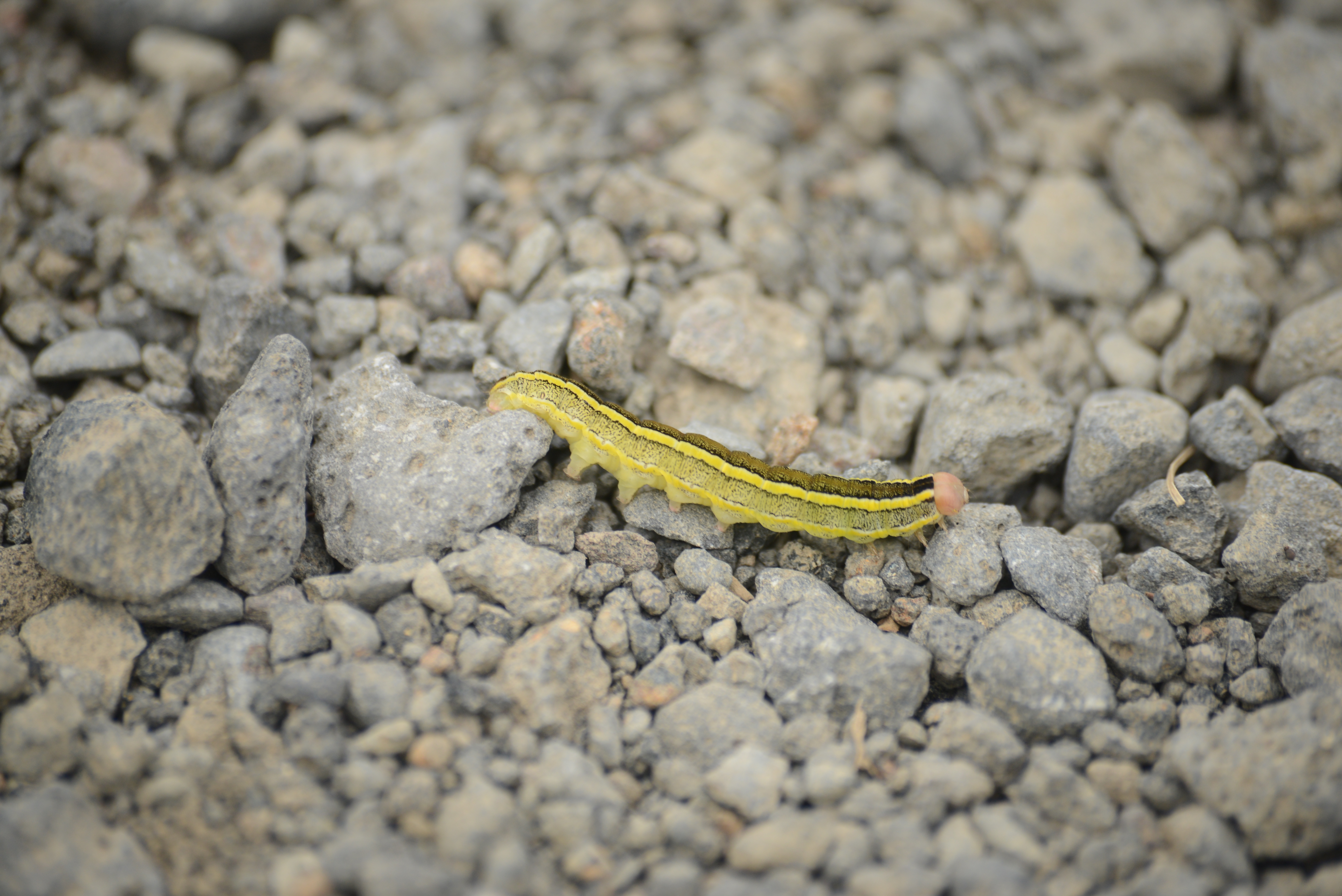 bruco (Ceramica pisi) a Þingvellir